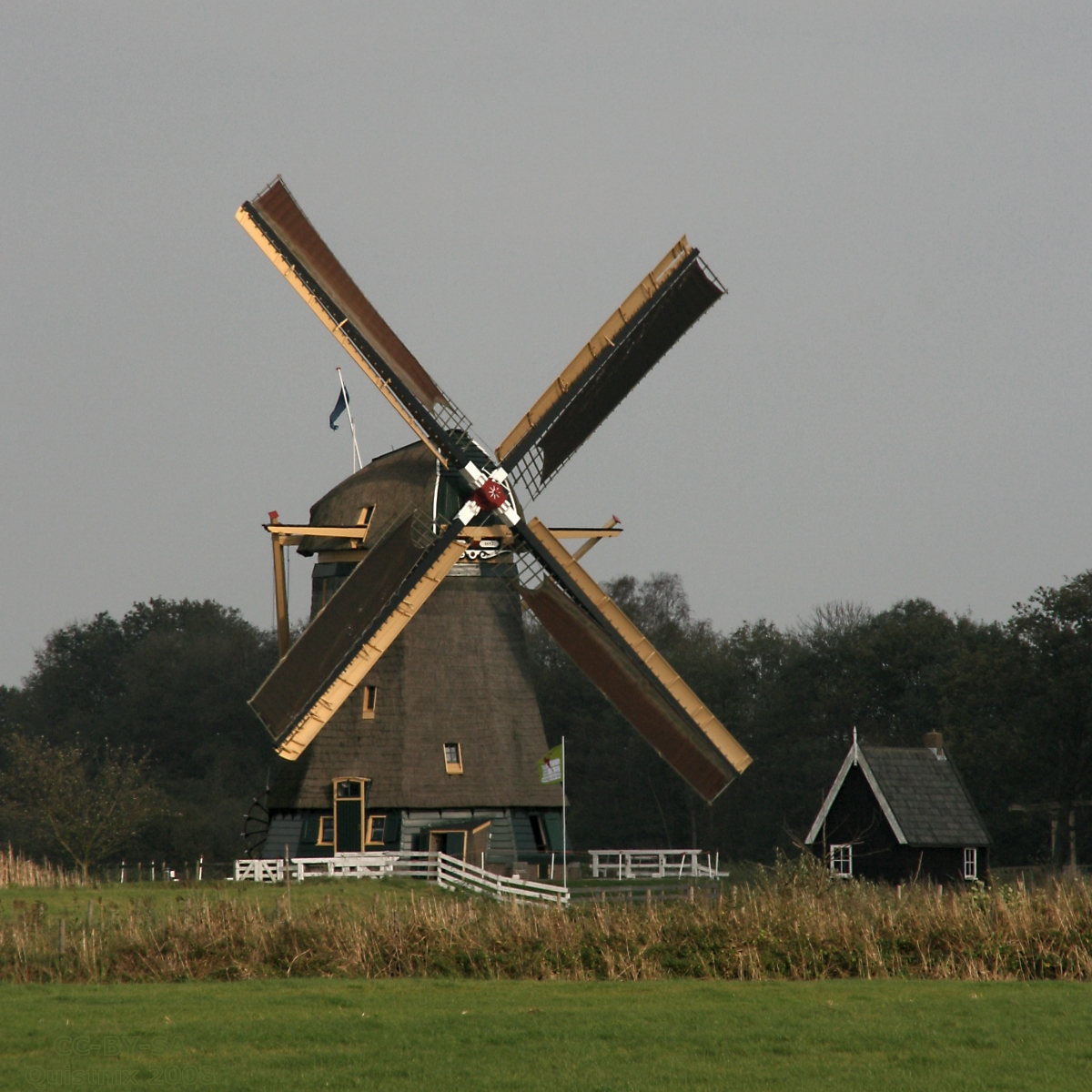 Loenen aan de Vecht: Loenderveense molen, met zeilen